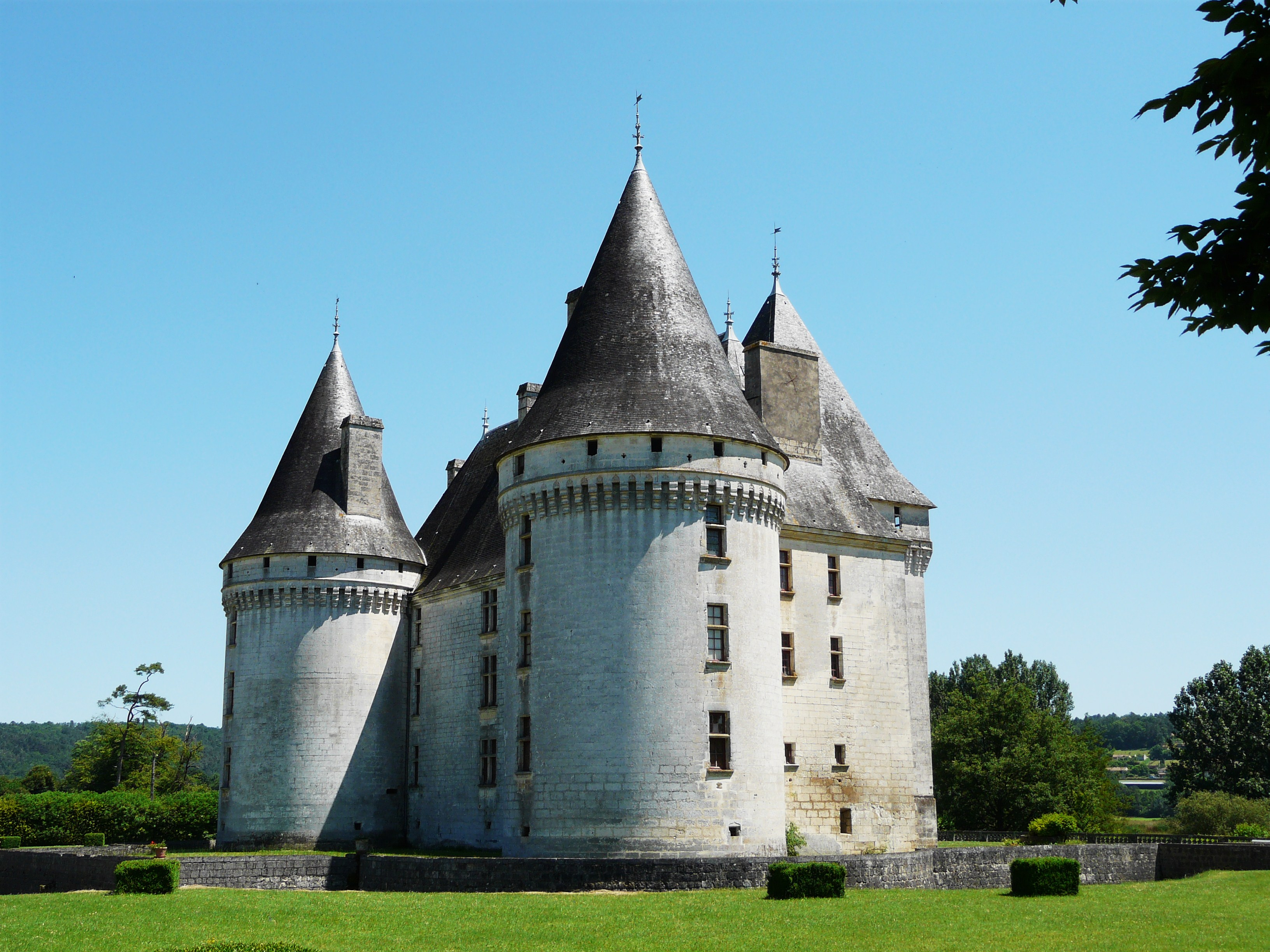 Le château des Bories vu depuis le nord-ouest, Antonne-et-Trigonant, Dordogne, France